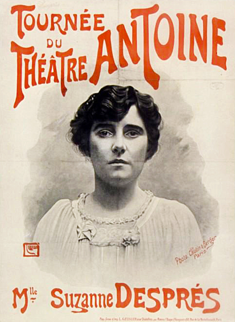 Tournée du Théatre Antoine. Mlle Suzanne Desprès: [affiche] / L. Geisler; photographe Cautin et Berger, Paris